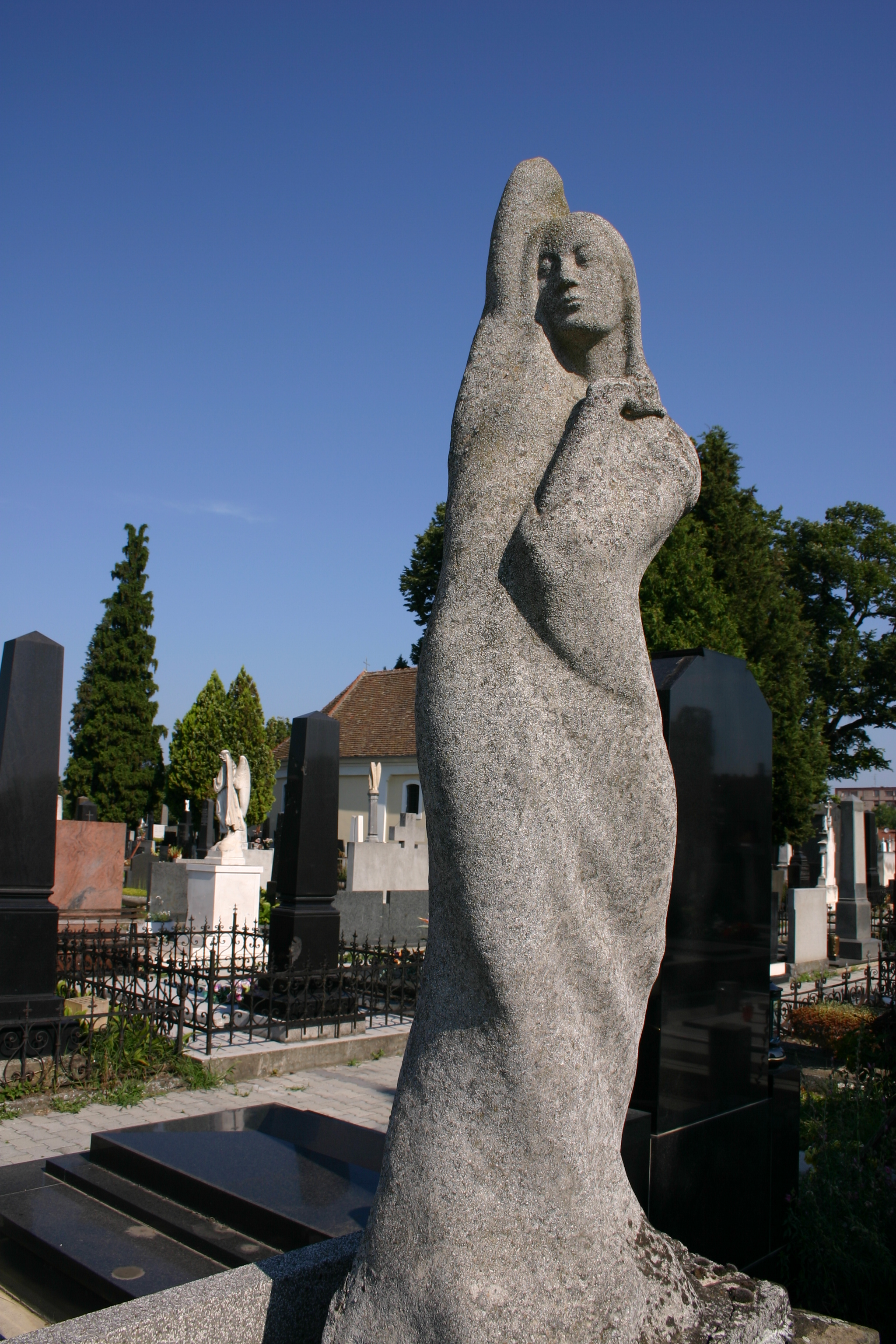 Skulptura